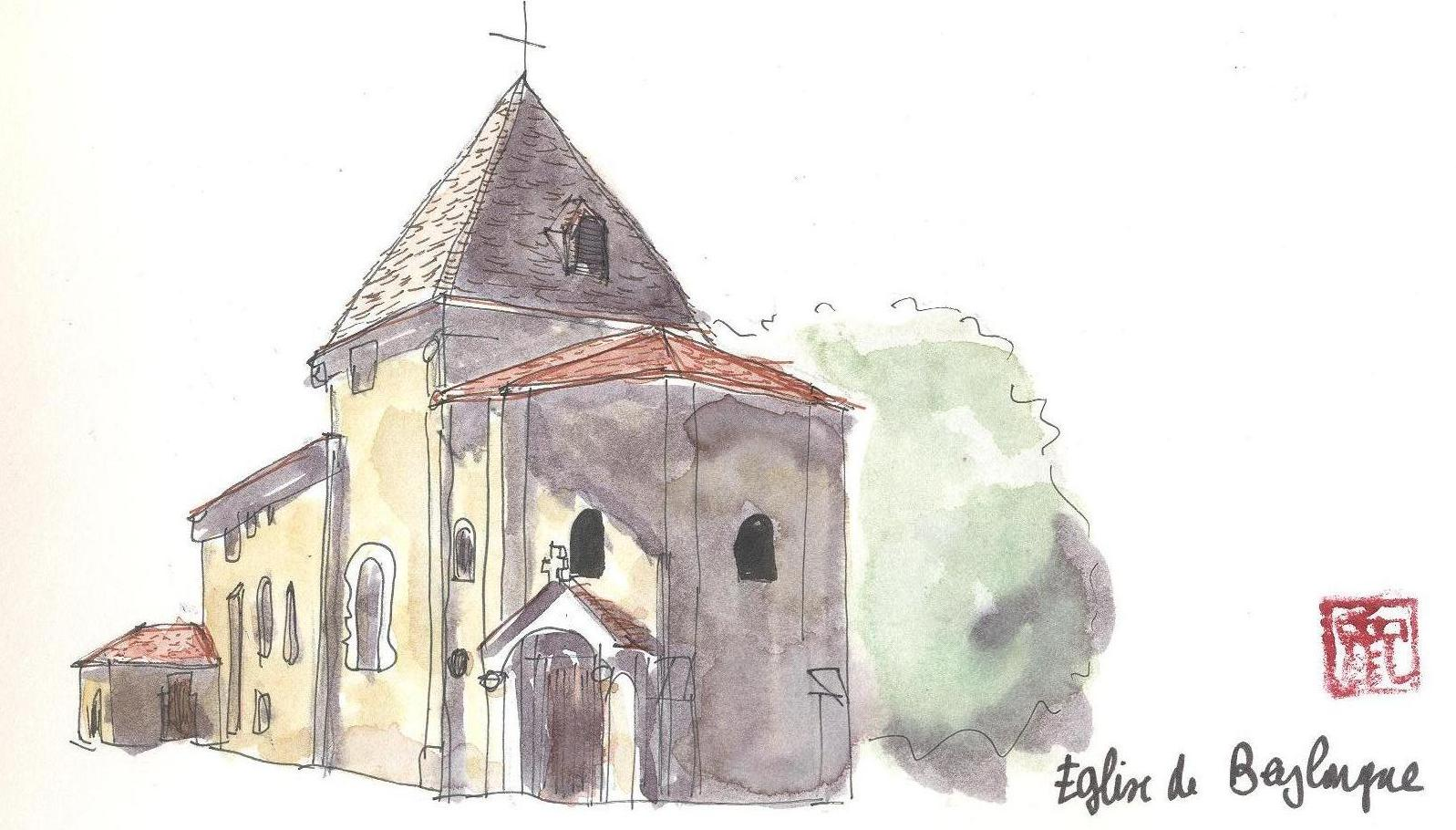 Aquarelle de l'église de Beylongue dans le département français des Landes.